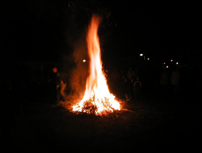 "Påskeld 2005, Mossen, Göteborg, taget av mig själv."